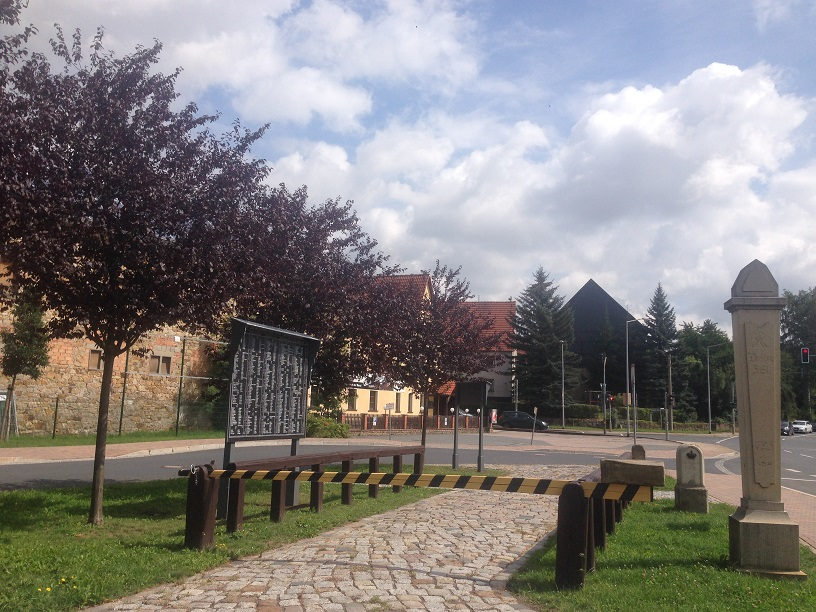 Geleiteinnahme Grumbach, Gesamtansicht